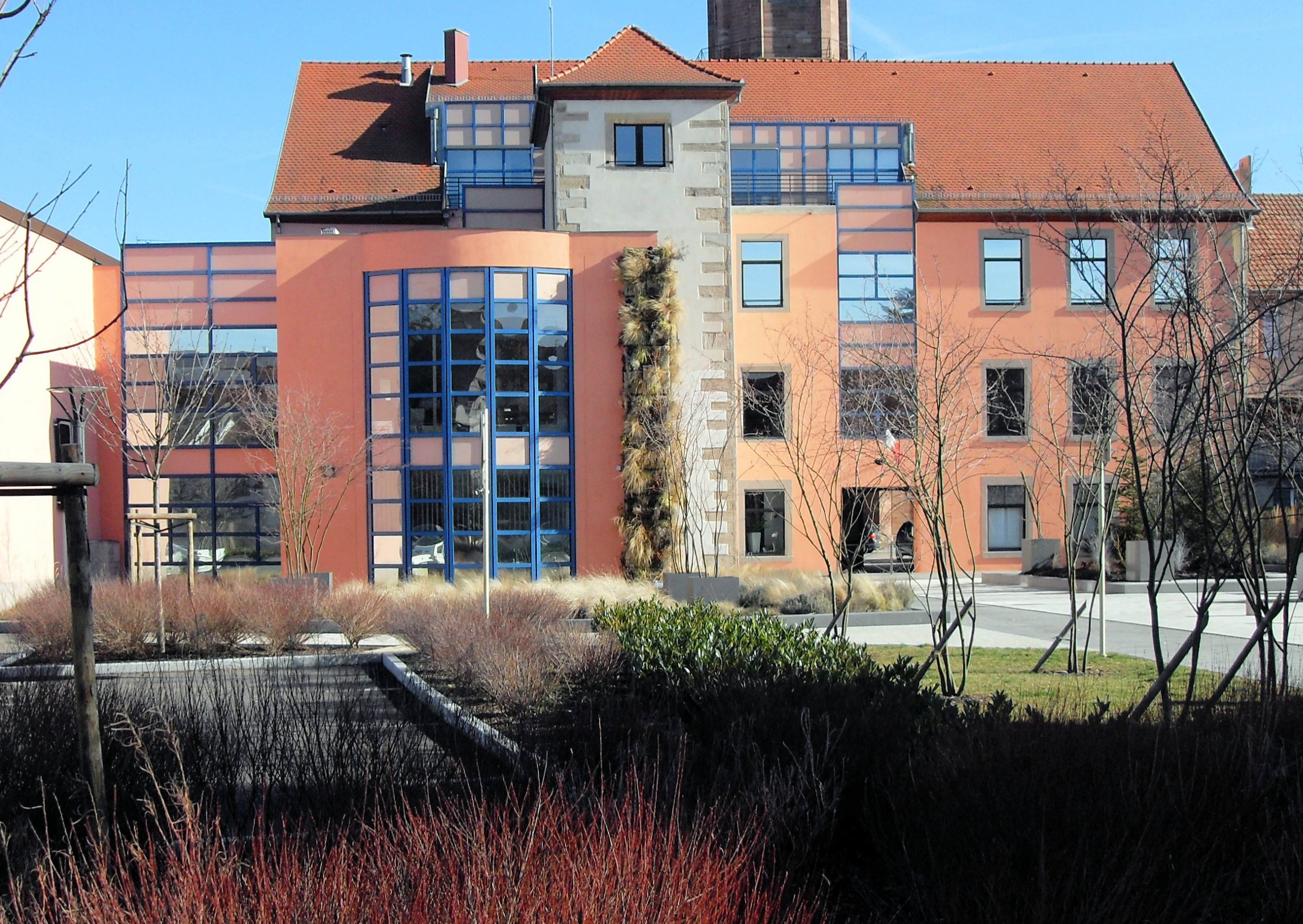 La mairie d'Ensisheim (côté ouest)